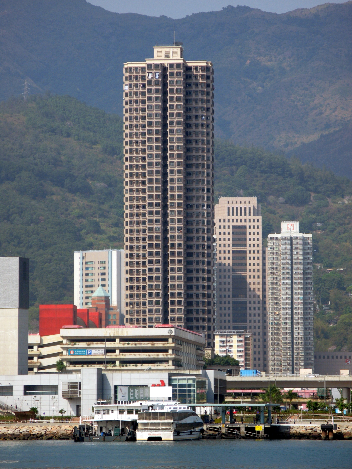 HK Skyline Plaza in Tsuen Wan